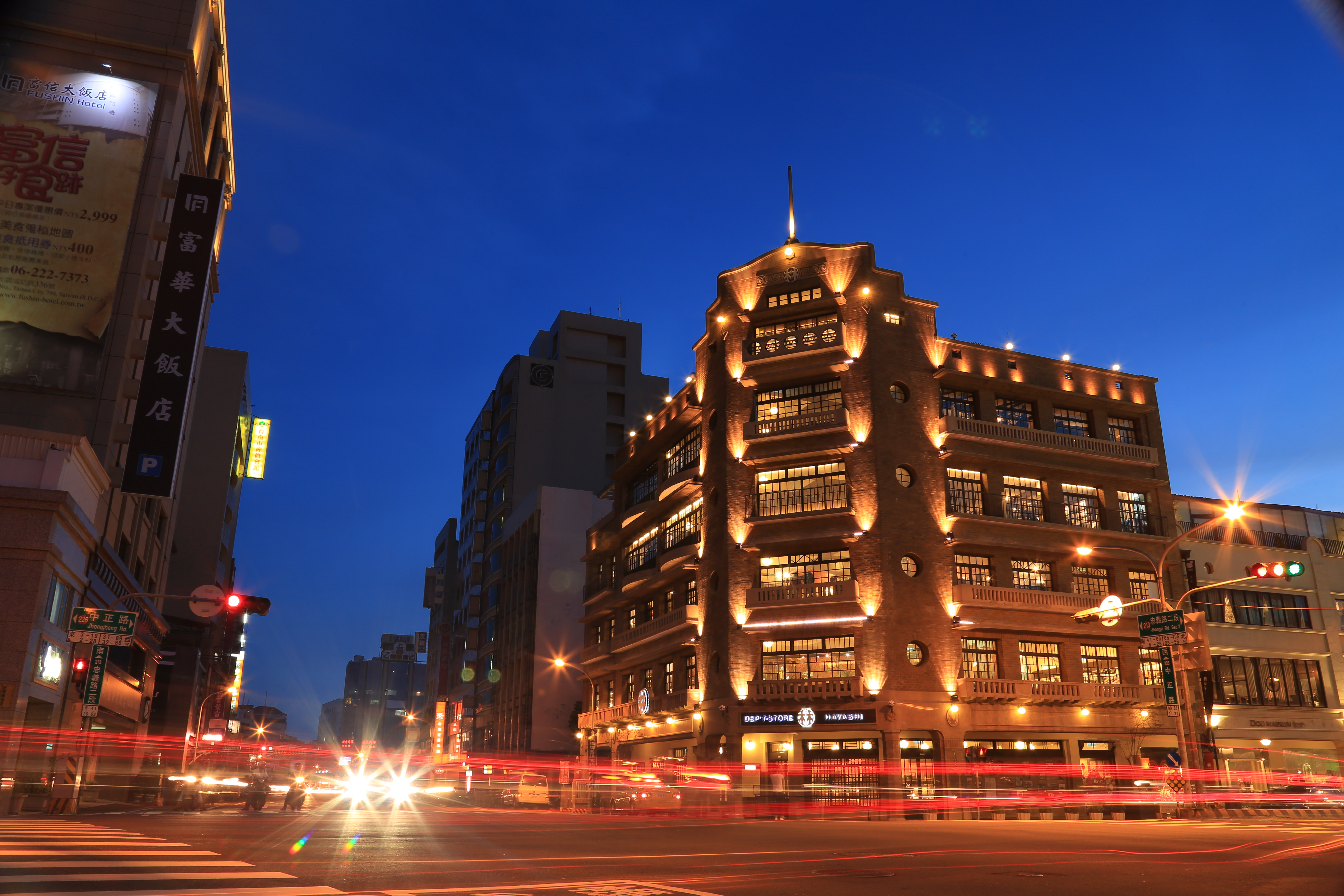 林百貨夜景與前方車軌。